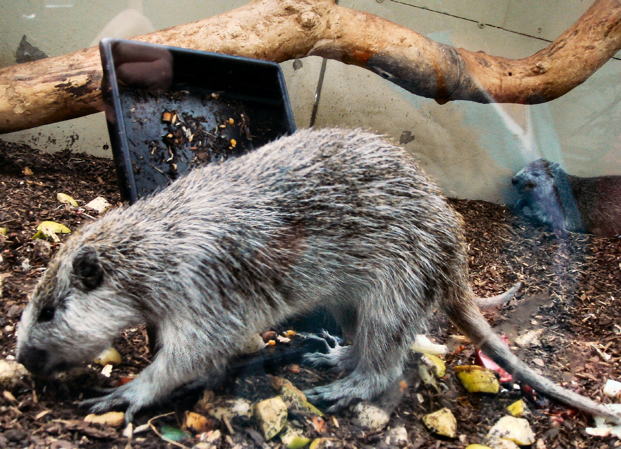 Capromys pilorides, Hutia de Cuba. Capromyidae. Wilhelma zoo - Stuttgart - Germany